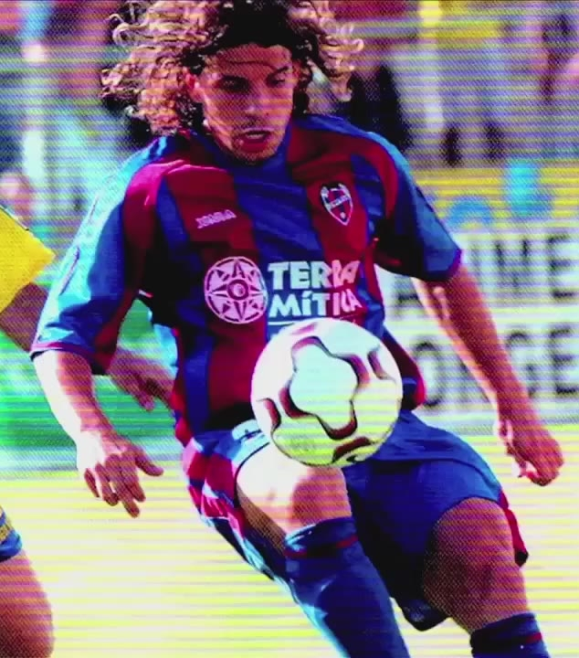 Gustavo Enrique Reggi, amb la samarreta del Llevant UE.